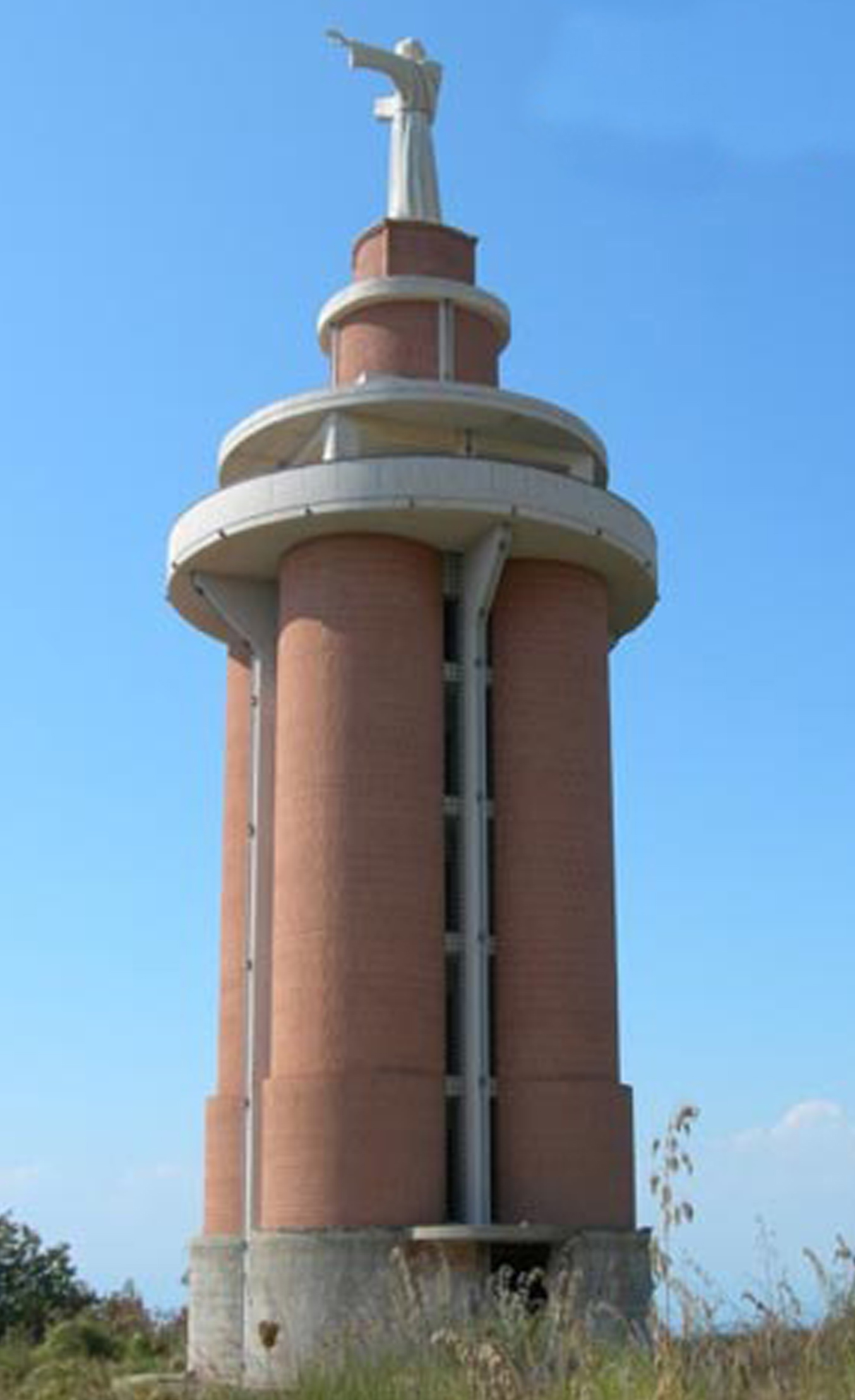 Carlo Iannuzzi, Opera Propria, Agropoli - San Francesco, GFDL e Creative Commons CC-BY-SA tutte le versioni (3.0, 2.5, 2.0 e 1.0), sono l'autore